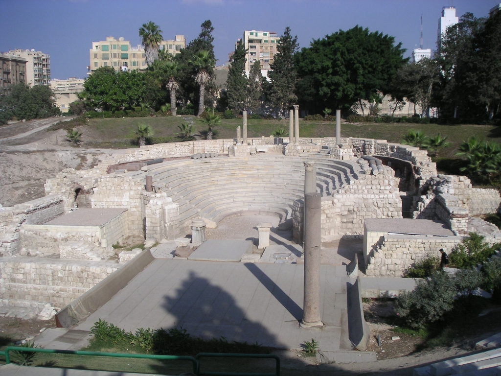 Vue du petit théâtre ou de l'odéon de Kom el-Dik à Alexandrie